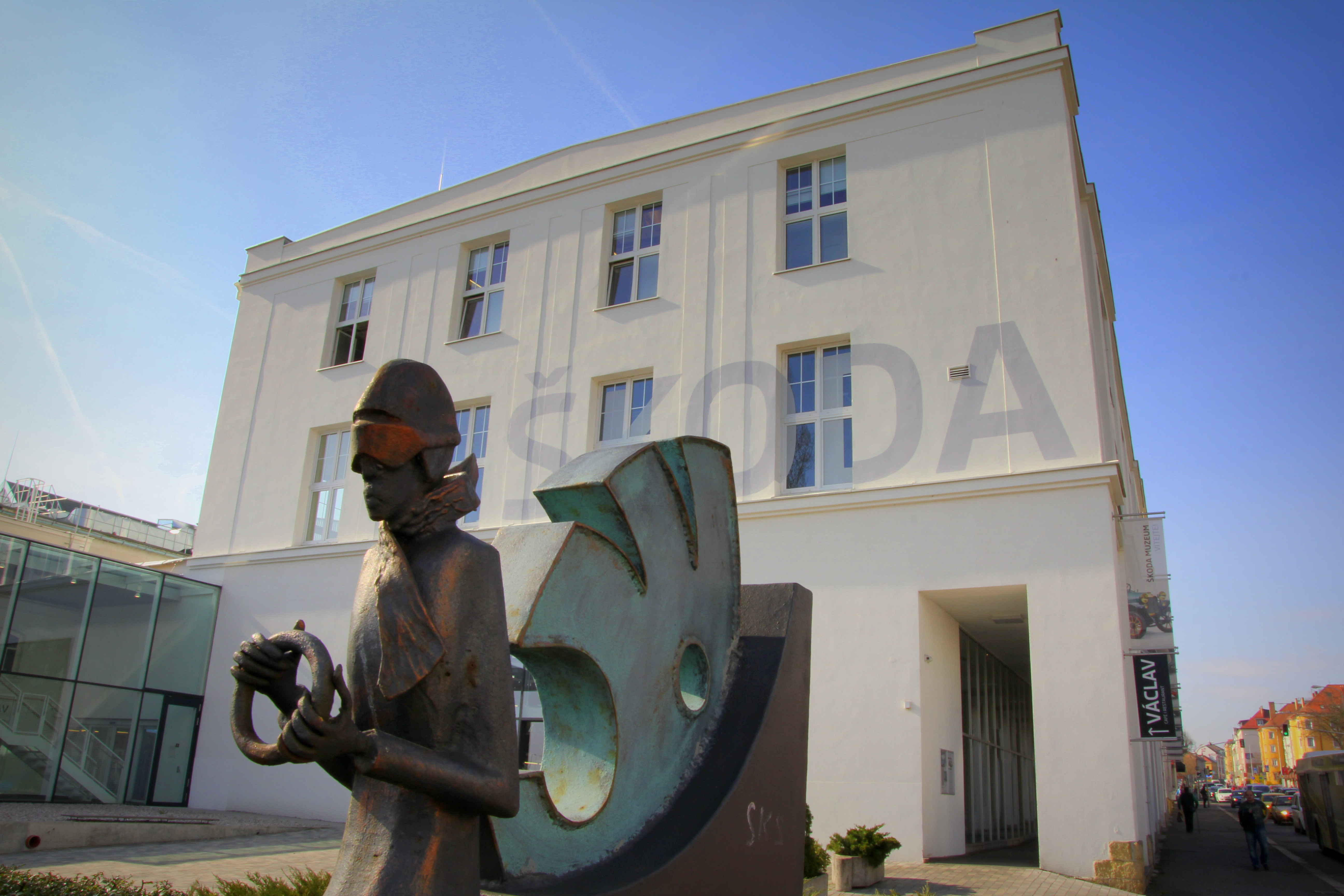 Škoda Museum, Mladá Boleslav